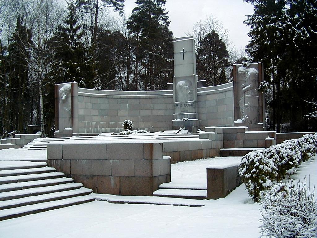 Rīga, J. Čakstes kapa piemineklis. 2001-01-01